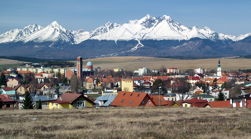 Kežmarok a Vysoké Tatry z Kamennej bane